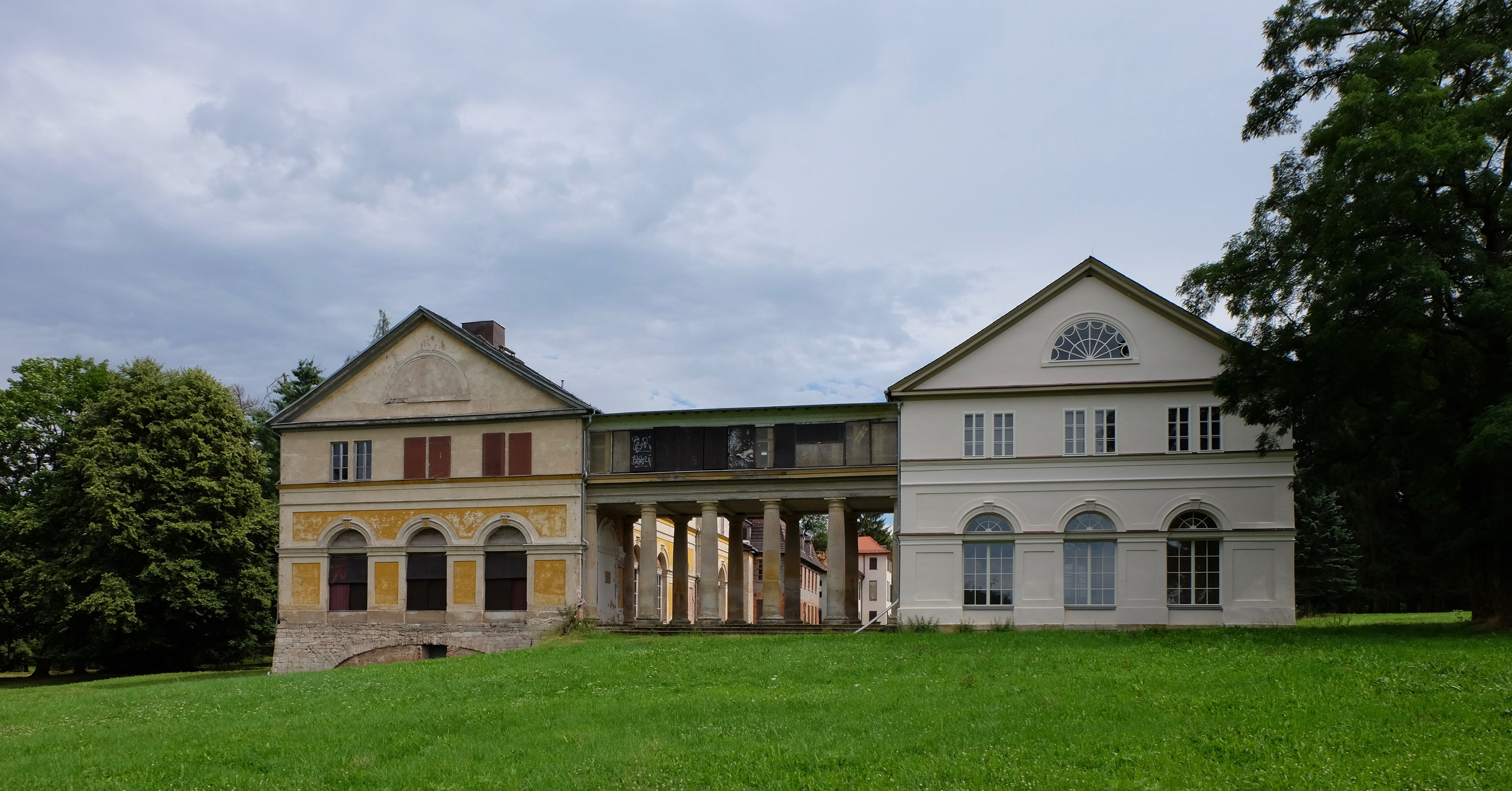 Pavillion (links) und Telemannsaal